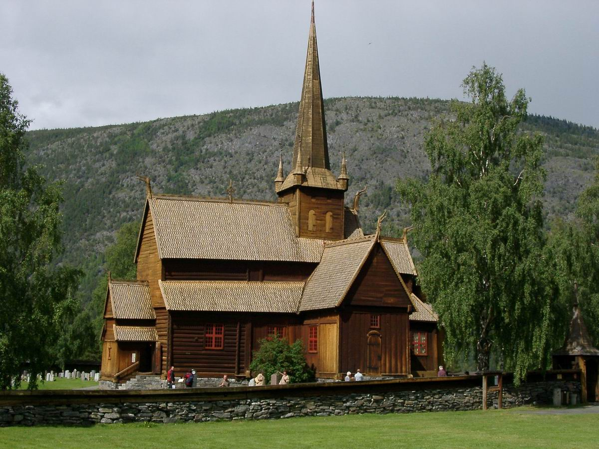 Stabkirche Lom